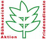 Das Symbol der Aktion Sühnezeichen Friedensdienste